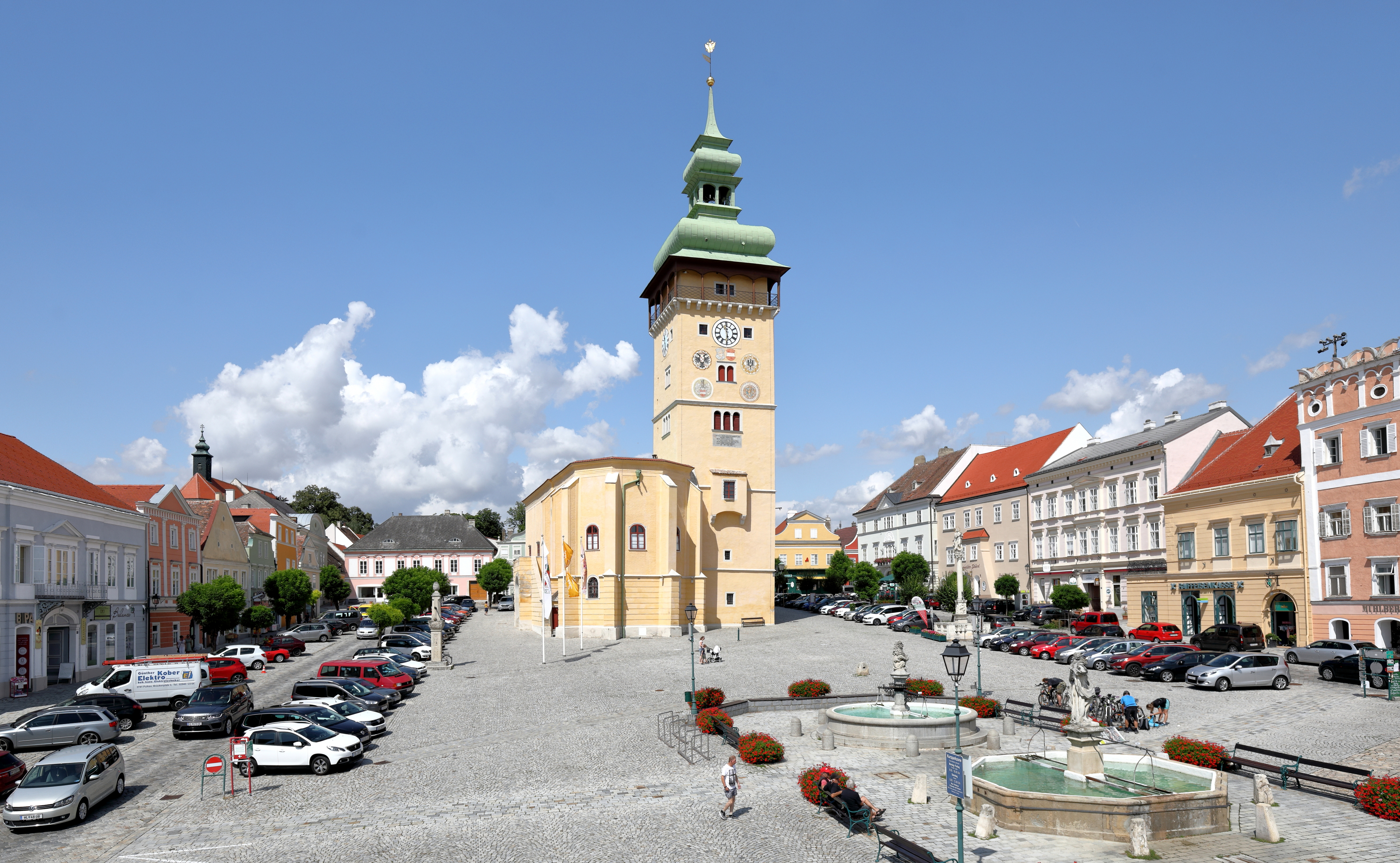 Ostsüdostansicht des Hauptplatzes der niederösterreichischen Stadtgemeinde Retz.Der große, rechteckige Platz hat eine Fläche von ca. 1,2 ha. Das ehemalige Rathaus ist der Mittelpunkt. Ursprünglich als gotische Kirche gebaut, blieb sie unvollendet und wurde Mitte des 16. Jahrhunderts zu einem Rathaus mit Rathausturm umgebaut. Weitere bedeutende Bauwerke am Hauptplatz sind das 1576 errichtete Sgraffitohaus, das Verderberhaus (erbaut 1577-1583), die 1744/45 errichtete Dreifaltigkeitssäule. Eine Pest- bzw. Mariensäule (errichtet 1680) und ein Pranger, sowie zwei Brunnen aus dem Ende des 18. Jahrhunderts. Einer mit einem Löwen, der das Stadtwappen hält und der andere mit einer Frauengestalt.